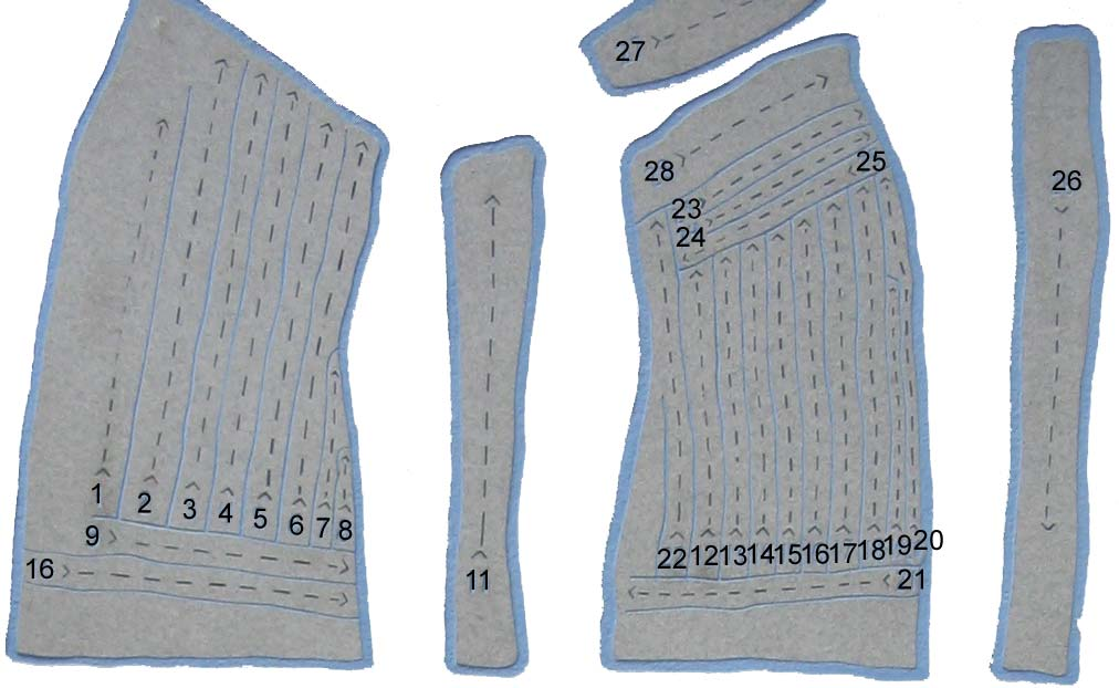 läsordning enligt Riksantikvarieämbetets informationsskylt bredvid Rökstenen (not. på bilden till vänster så ska 16 istället vara 10)